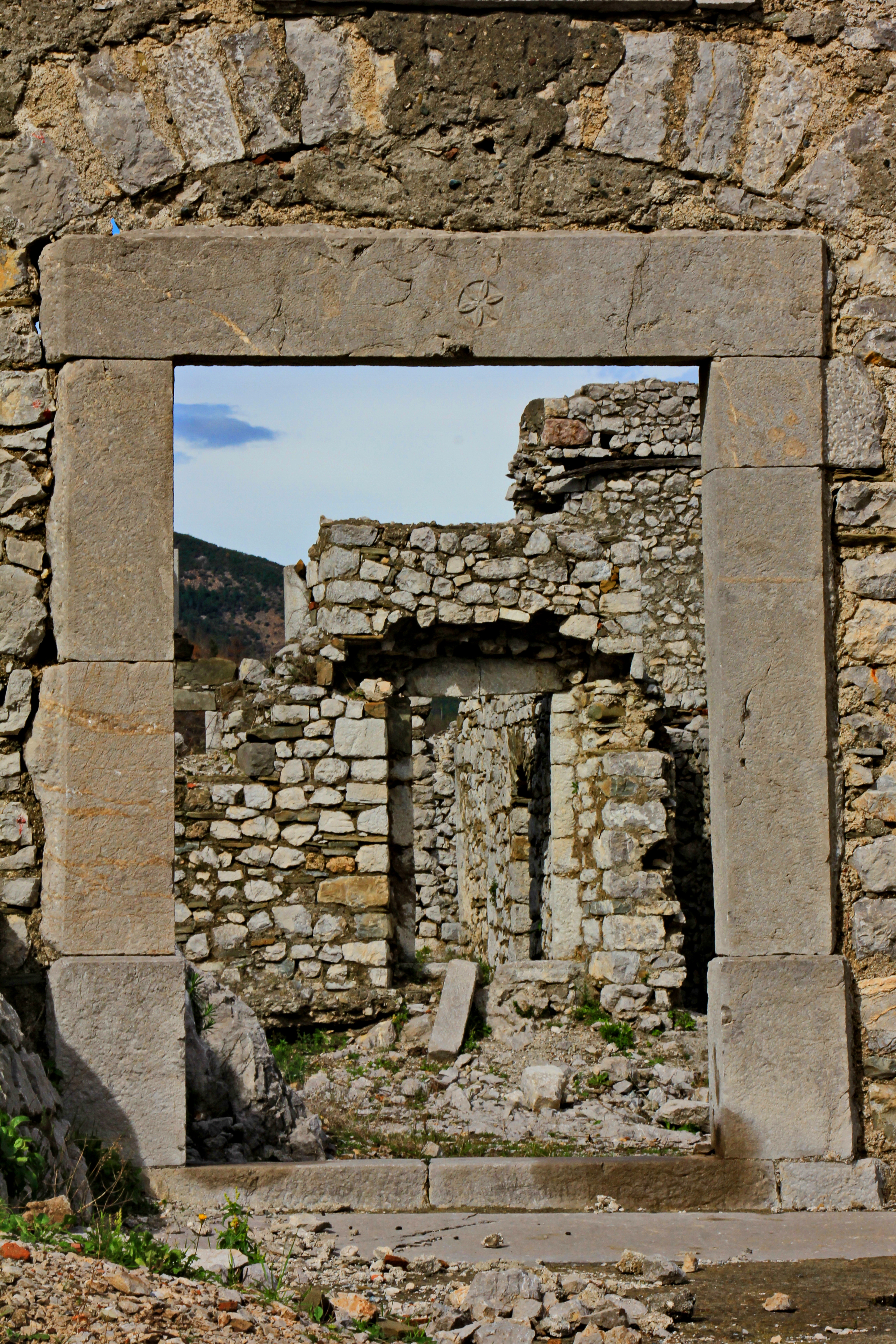 Kisha e Manastirit Te Rubikut